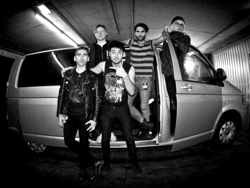 Atlas Losing Grip in Würzburg, 2012